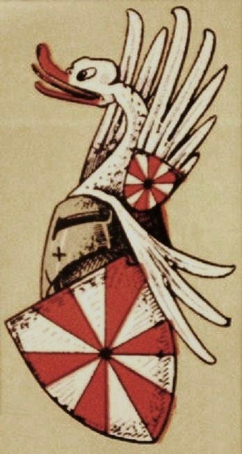 Stammwappen der Waldbott von Bassenheim.